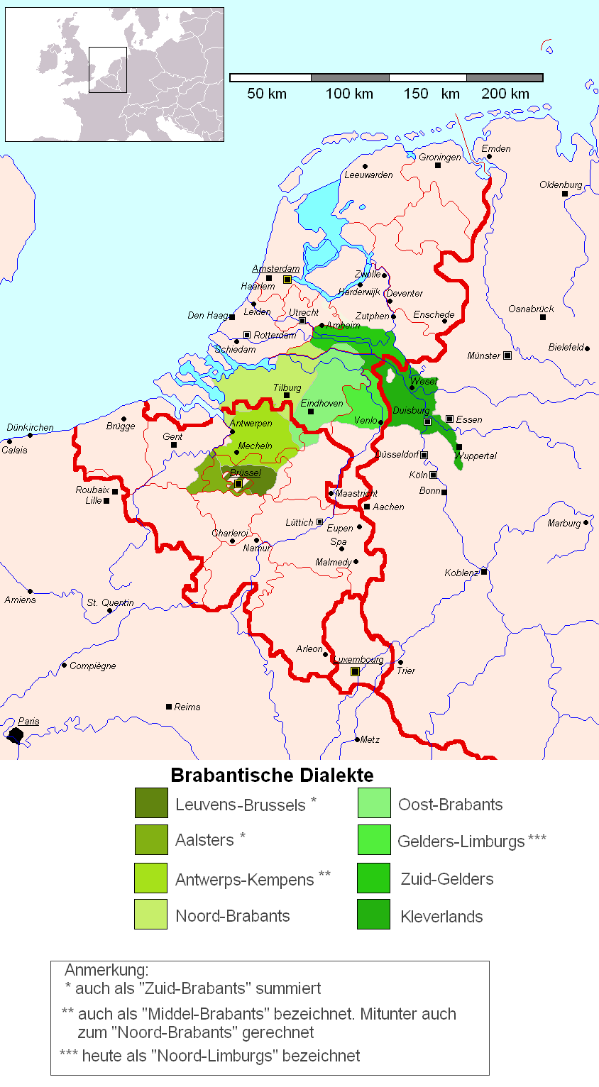 Einteilungskarte der brabantischen Dialekte